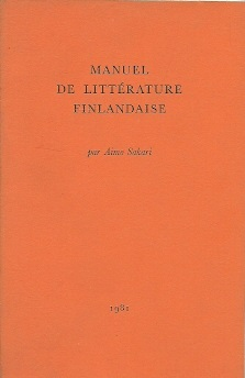 kansi Aimo Sakarin teoksessa Manuel de littérature Finlandaise (1981)